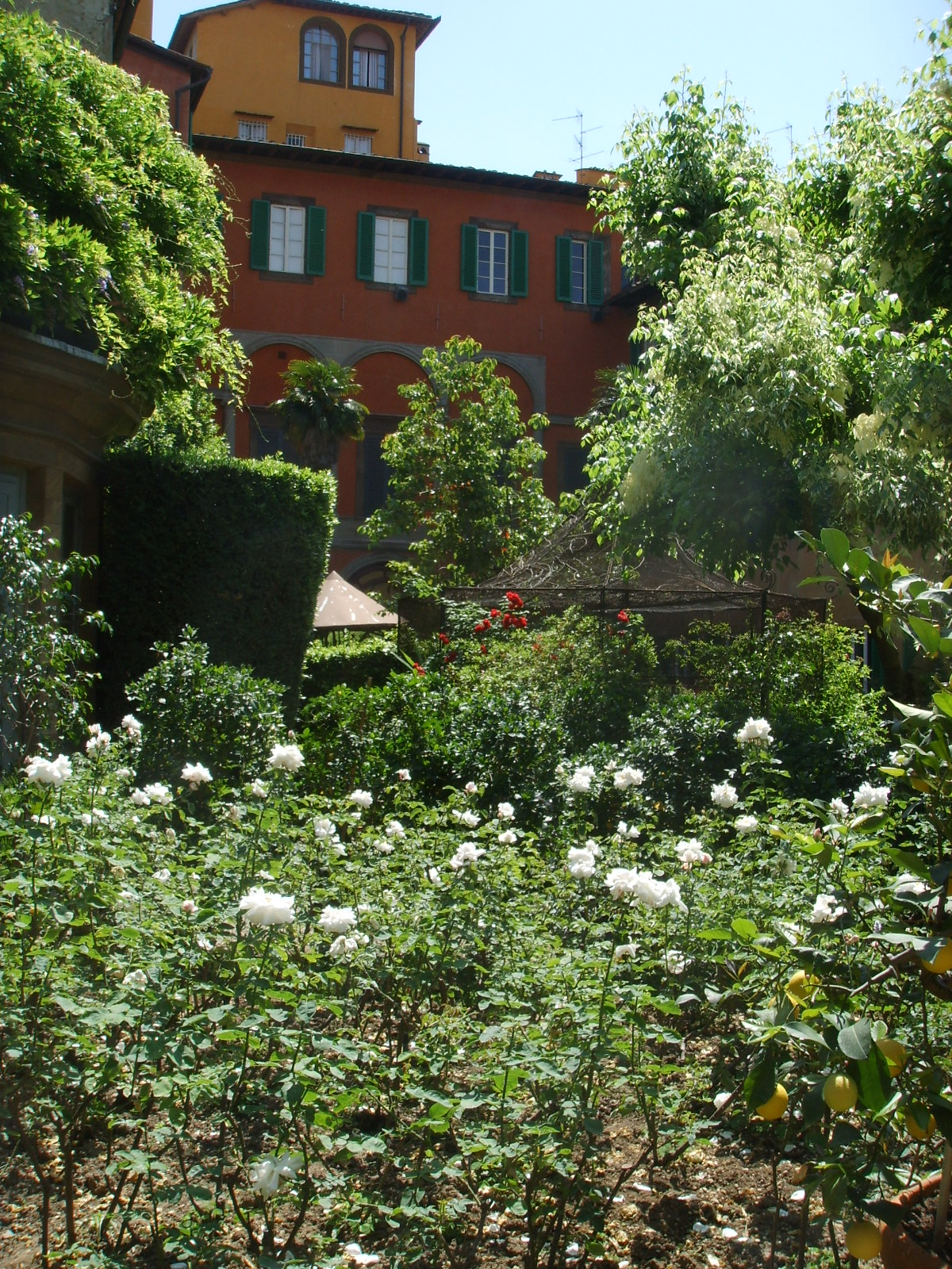 see description